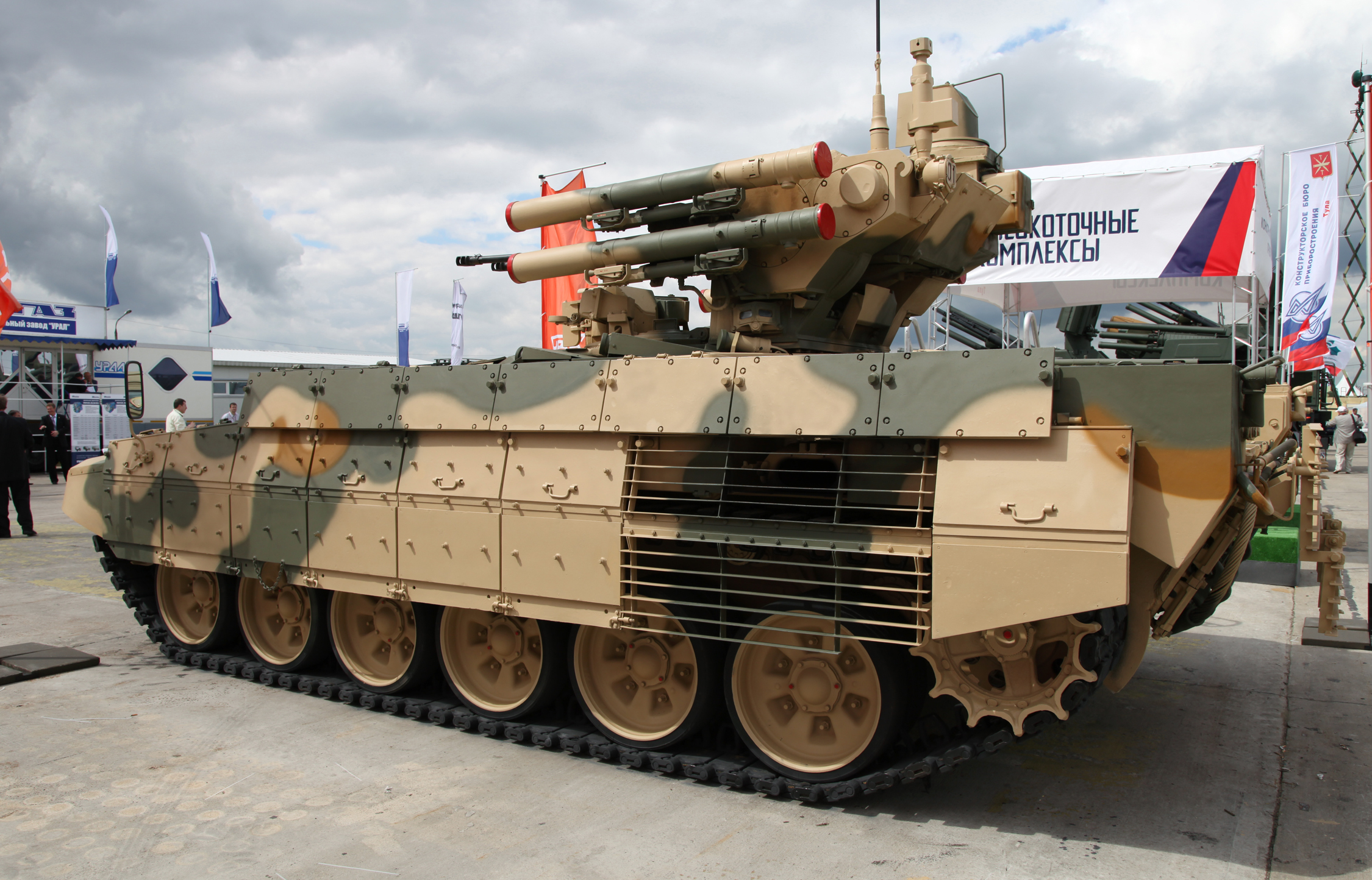 Боевая машина поддержки танков БМПТ (Tank support combat vehicle BMPT)